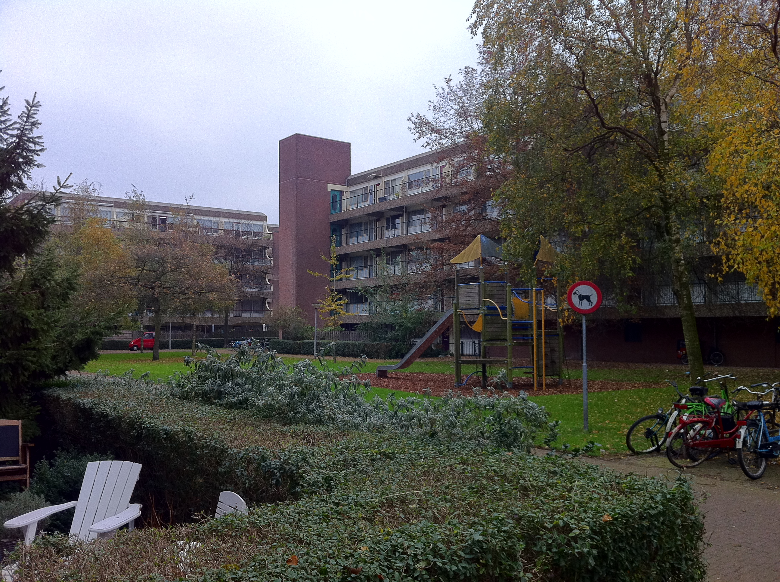 Amsterdam - Kattenburg. Olifantswerf Stadsvernieuwing. Opdrachtgever woningbouwvereniging Rochdale, oplevering 1976.